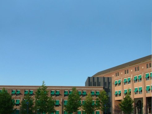 NRE Hoofdgebouw in Eindhoven